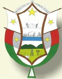 Escudo oficial del municipio de Puerto Nare